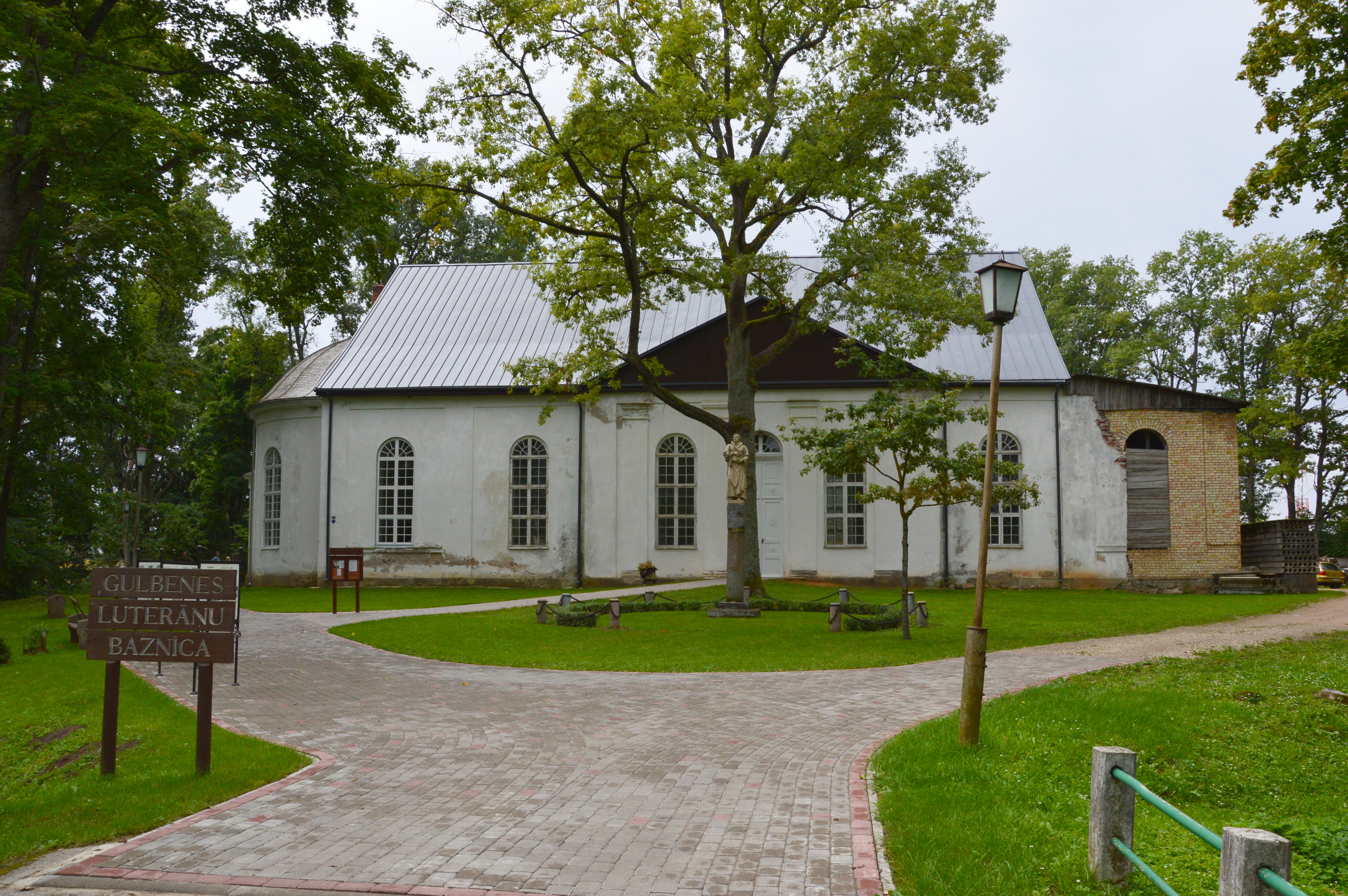 Gulbene luteri kirik